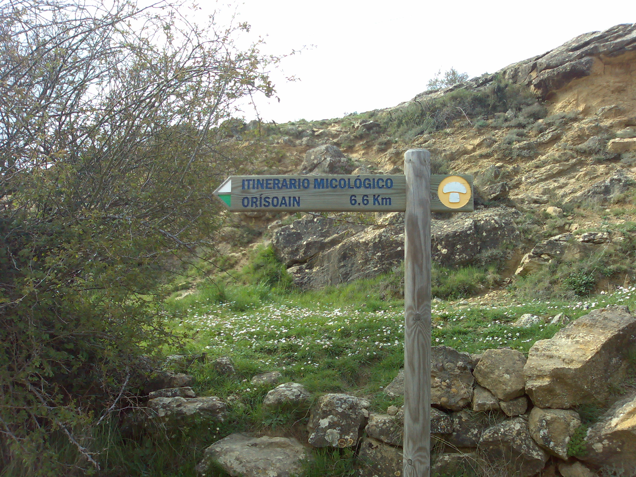 Ibilbide mikologikoak Orisoainen inguruetan.